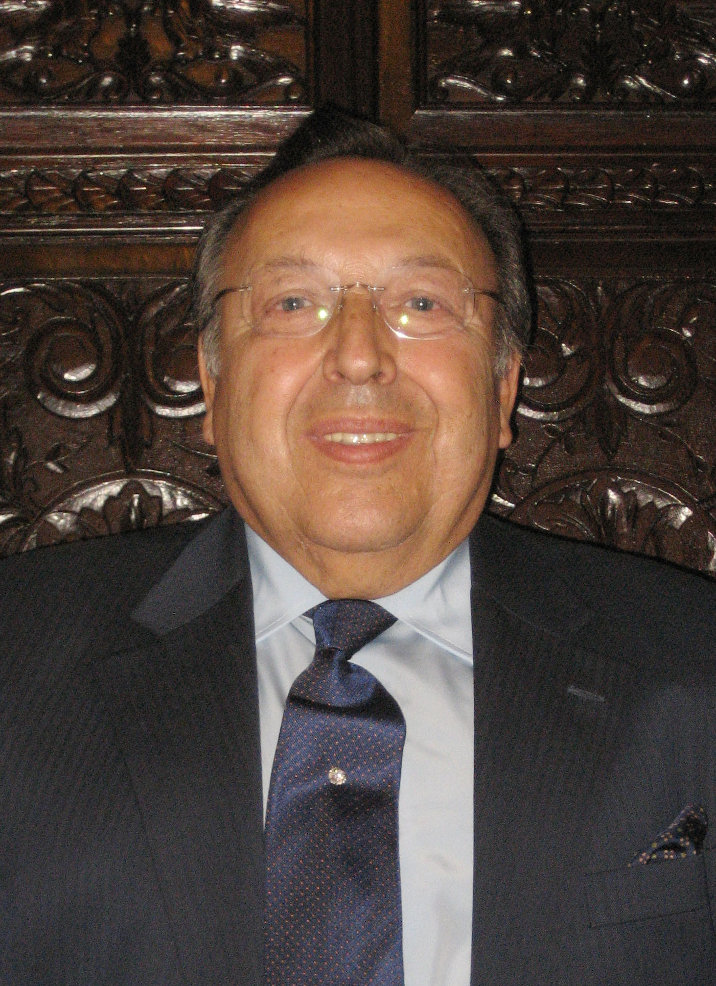 Foto Paco Cepero Academia San Dionisio